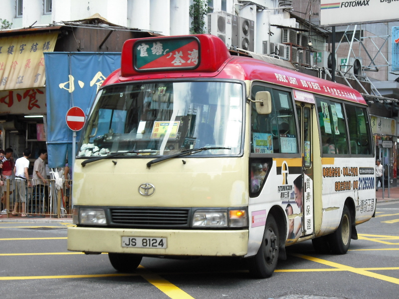 中文（香港）: 豐田第4代小巴，車頭採用方燈設計，俗稱「方燈子彈頭」。